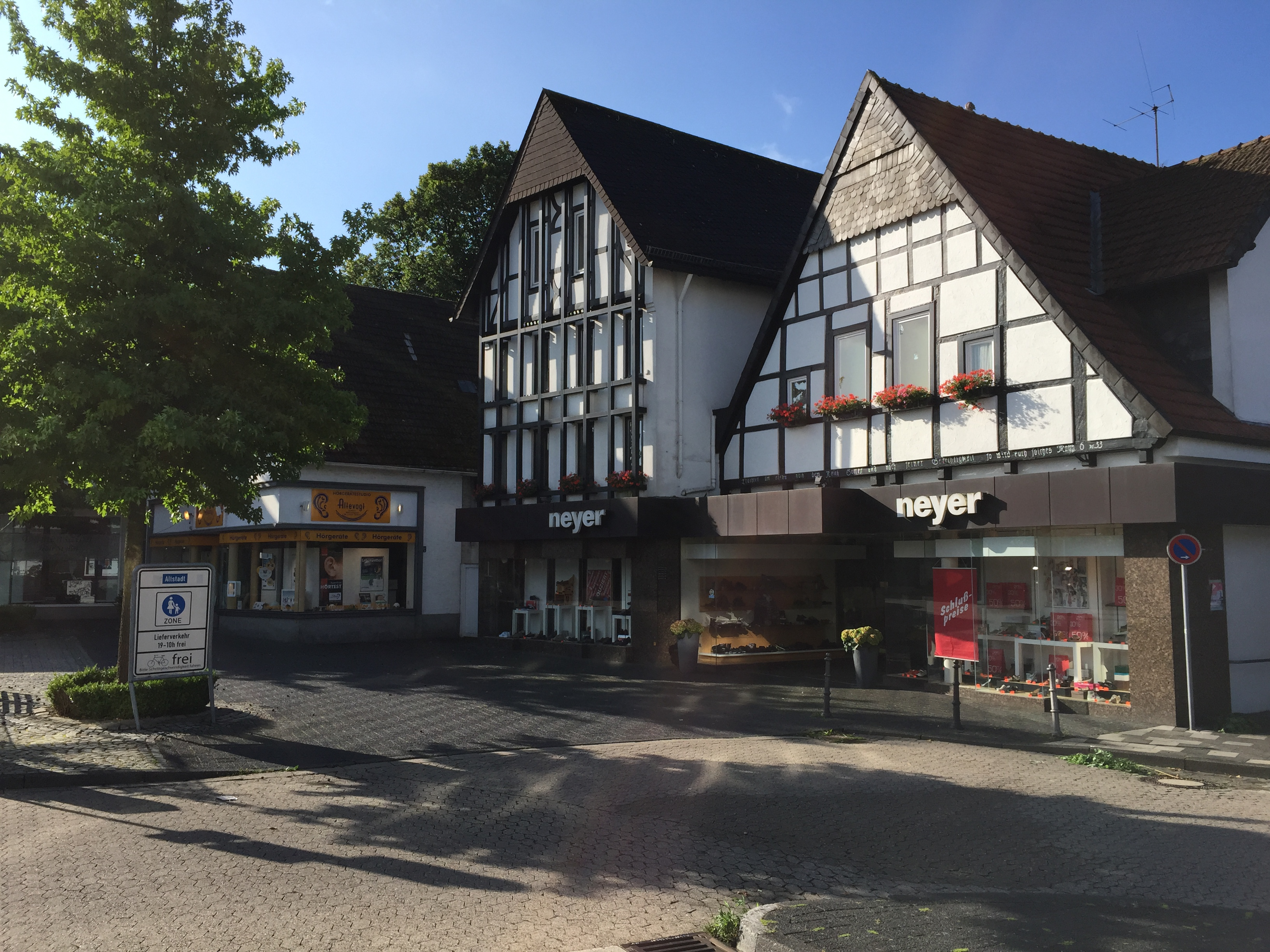 der sehr maßstäbliche Fachwerkgiebel aus dem Jahr 1649 mit der passenden modernen ErweiterungThis is a photograph of an architectural monument., no. 0